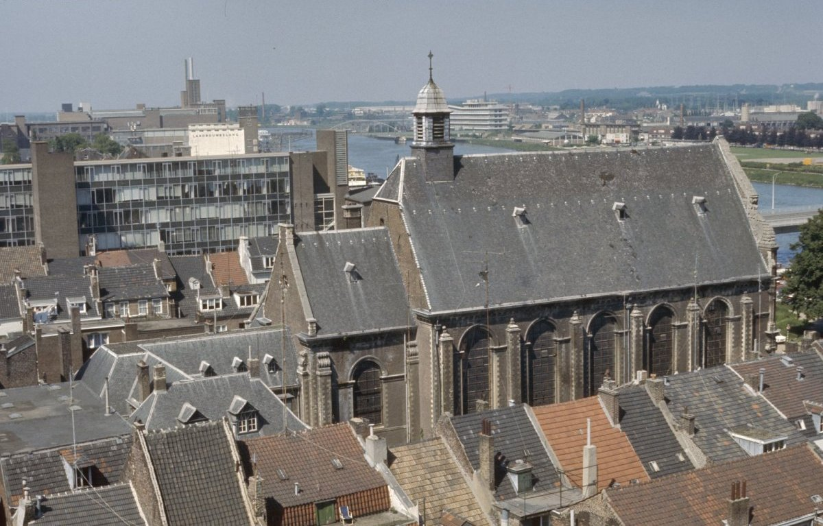 Stadsgezicht: Stadsgezicht This is a possible Rijksmonument: Find the monument in the Monuments database: in Maastricht All Rijksmonumenten in Maastricht Is this a Rijksmonument? Yes No More information about this project and help. More images to work at in Category:Possible Rijksmonumenten.